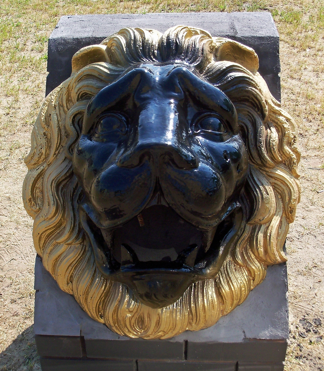 Głowa lwa pochodząca ze spichlerza nad Narwią, obecnie znajdująca się na jednym z osiedli w Nowym Dworze Mazowieckim.